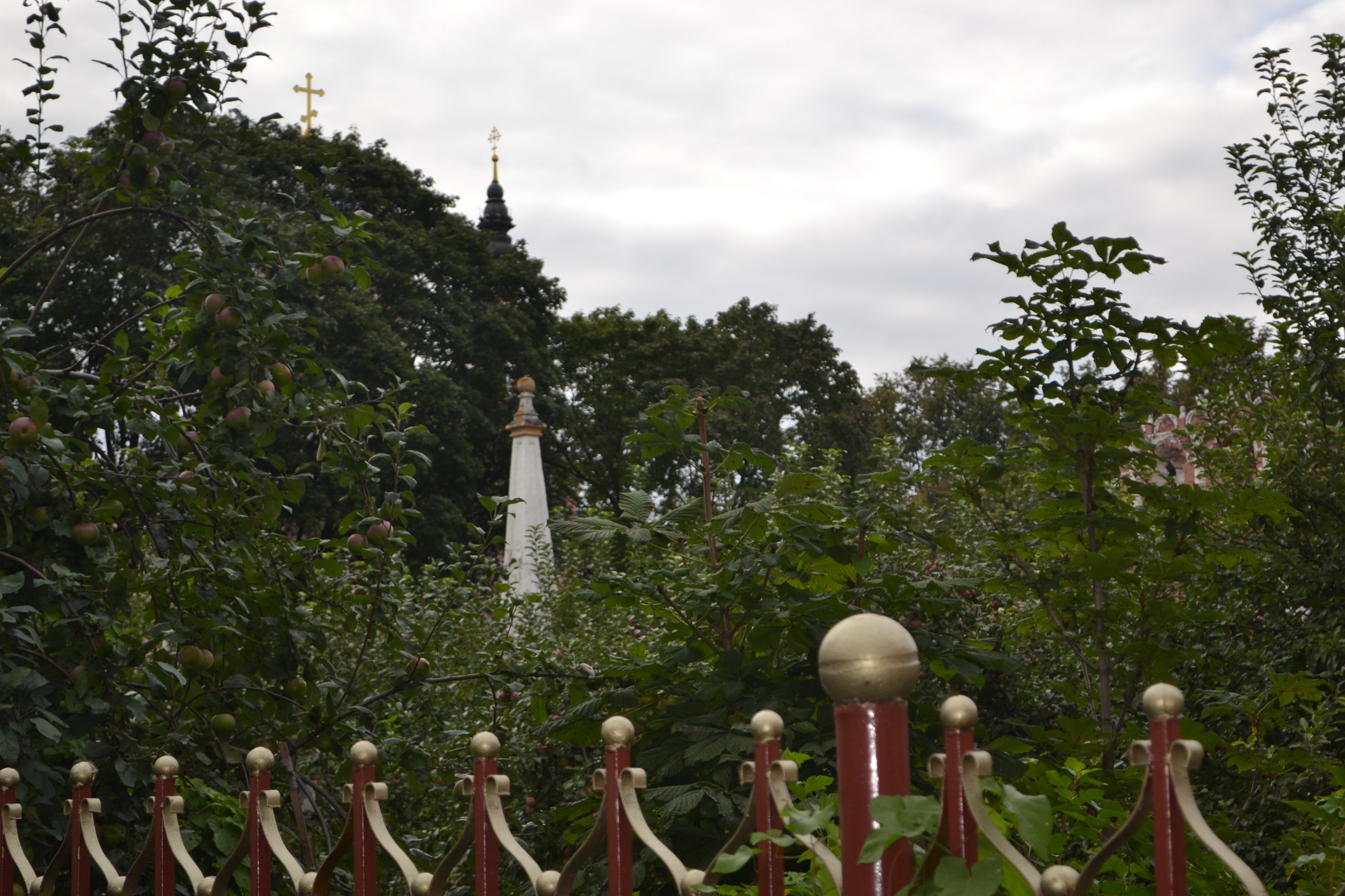 Обелиск: Коньково, Юго-Западный округ, Москва